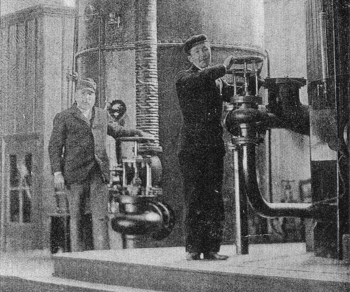 ドイツで研修時代の後の明治製菓会長 相馬半治